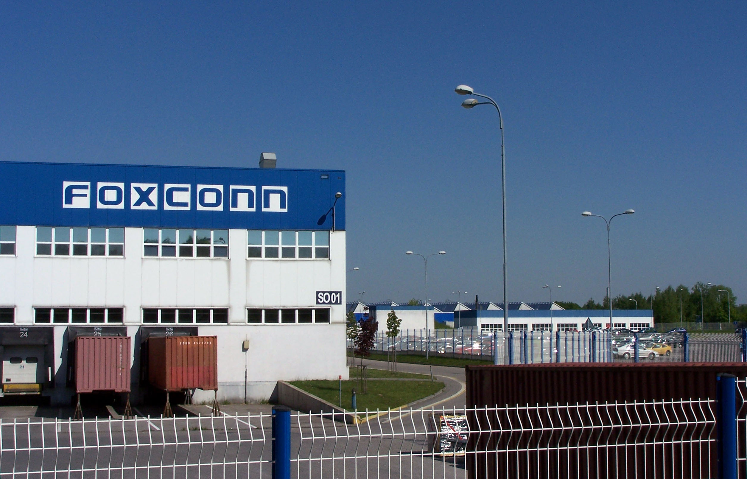 Foxconn Pardubice